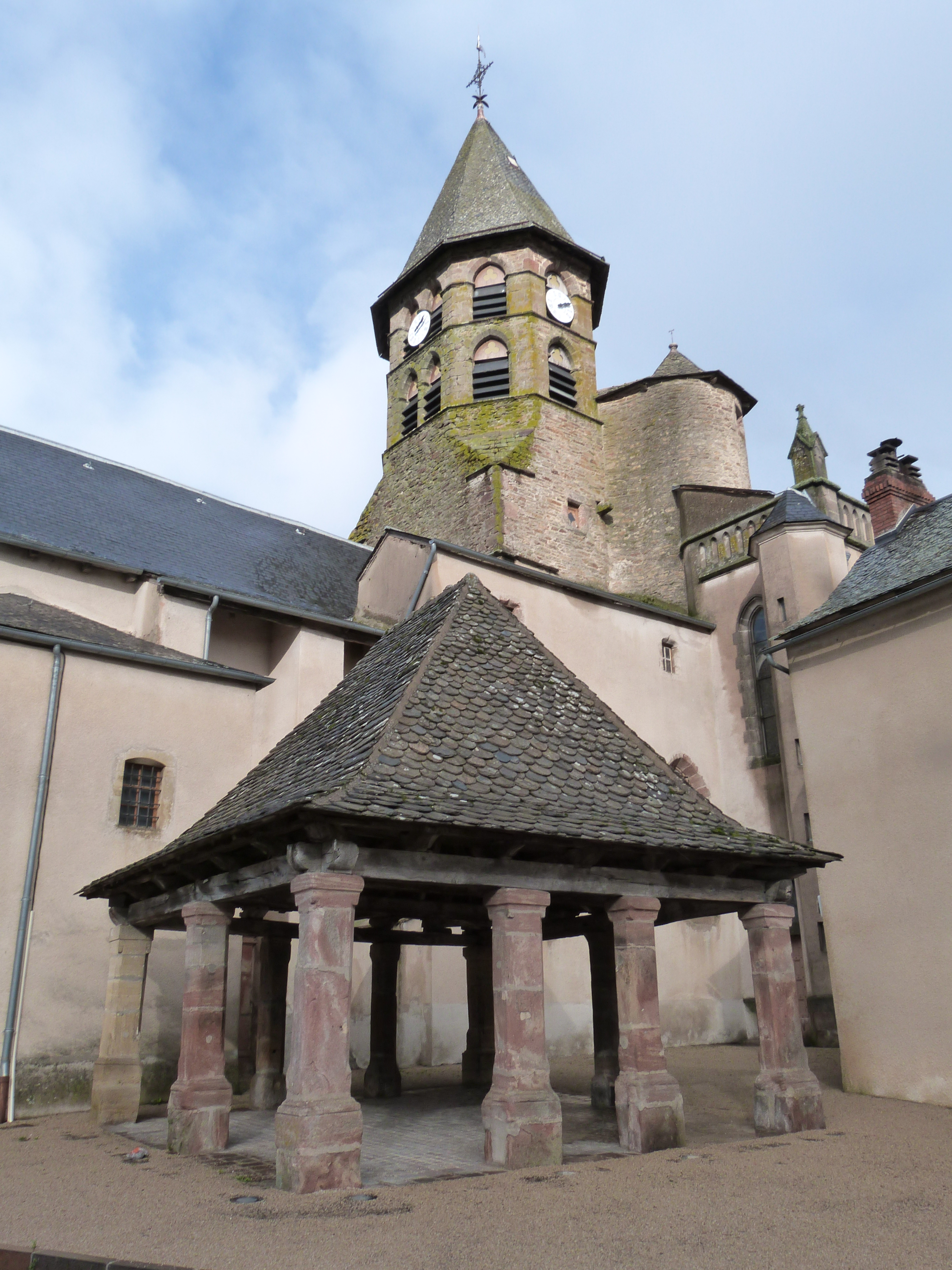 Halle près de la basilique de Ceignac